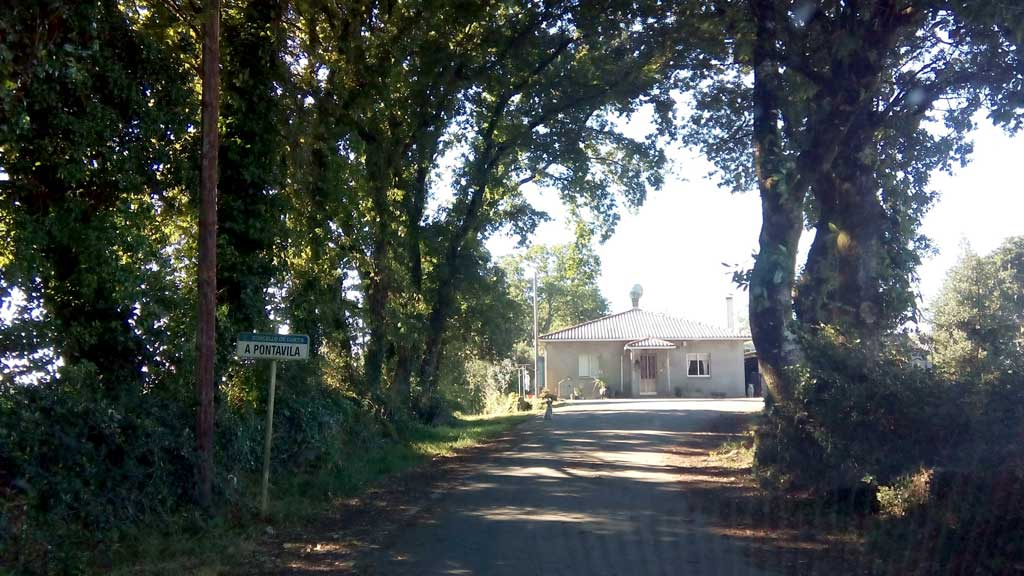 Vista de Pontavila, Curtis.